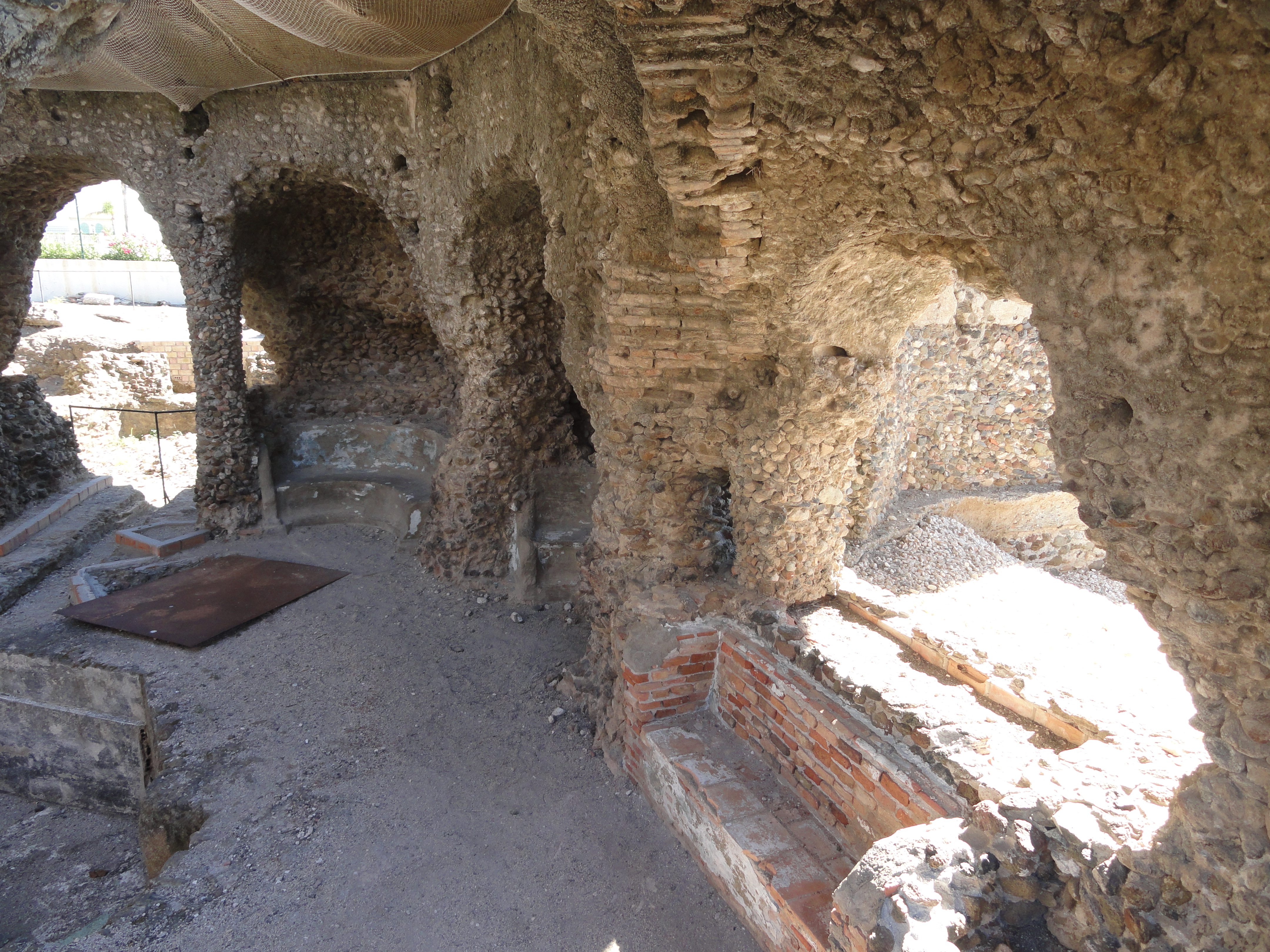 Termas romanas de las Bóvedas